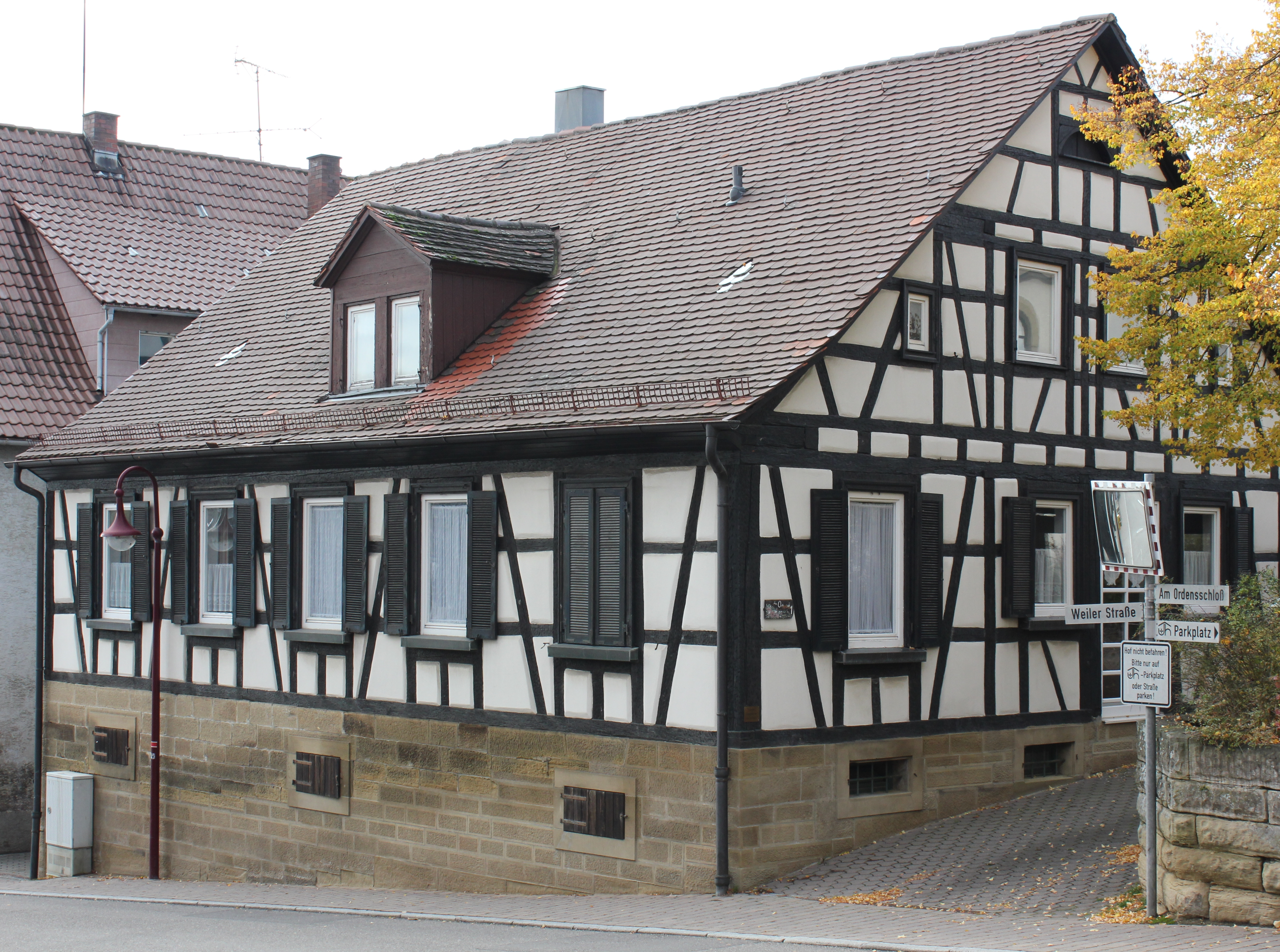 Altes katholisches Pfarrhaus in Affaltrach, heute Teil des Gemeindezentrums Johanniterhaus